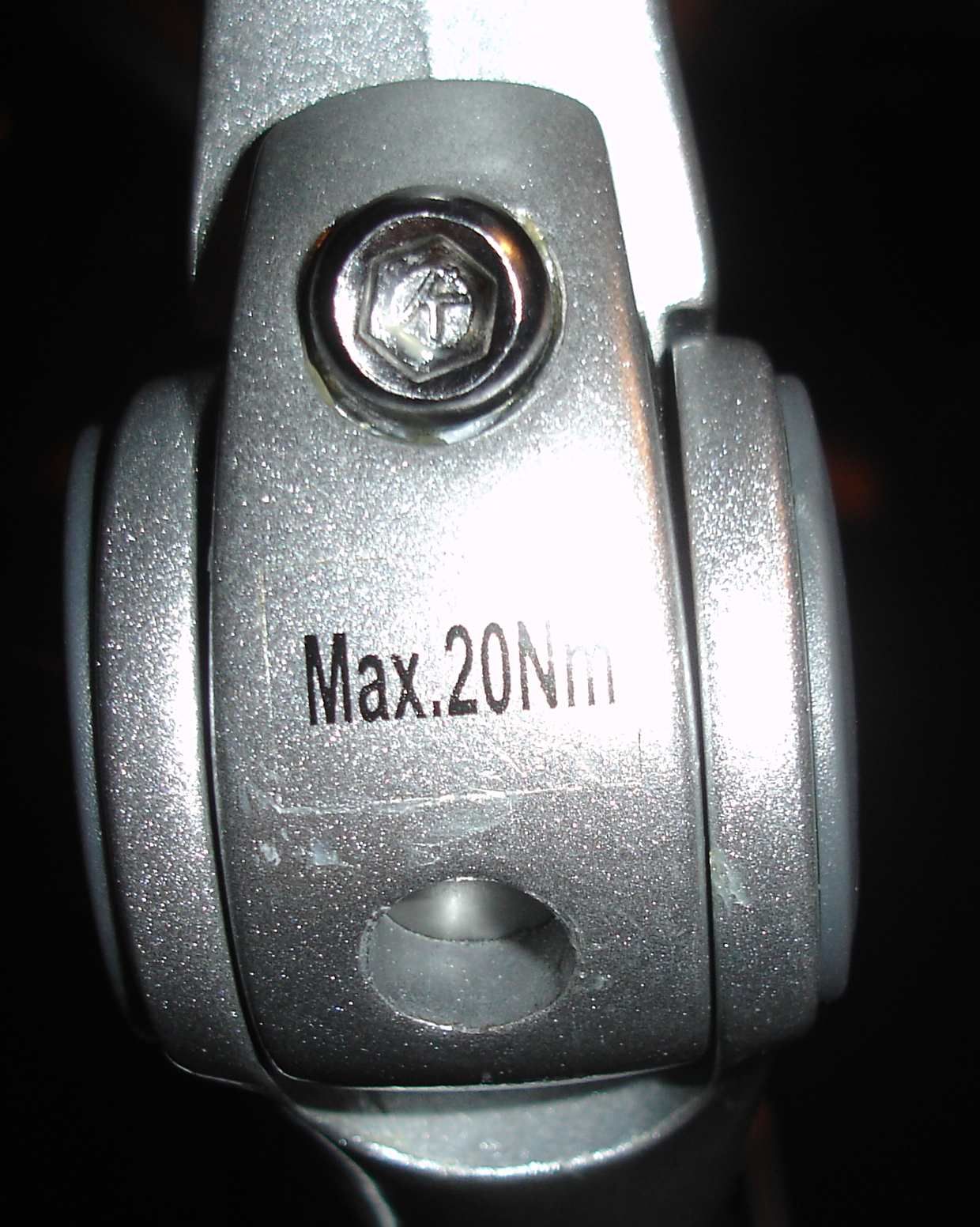 Display on bicycle handle bar